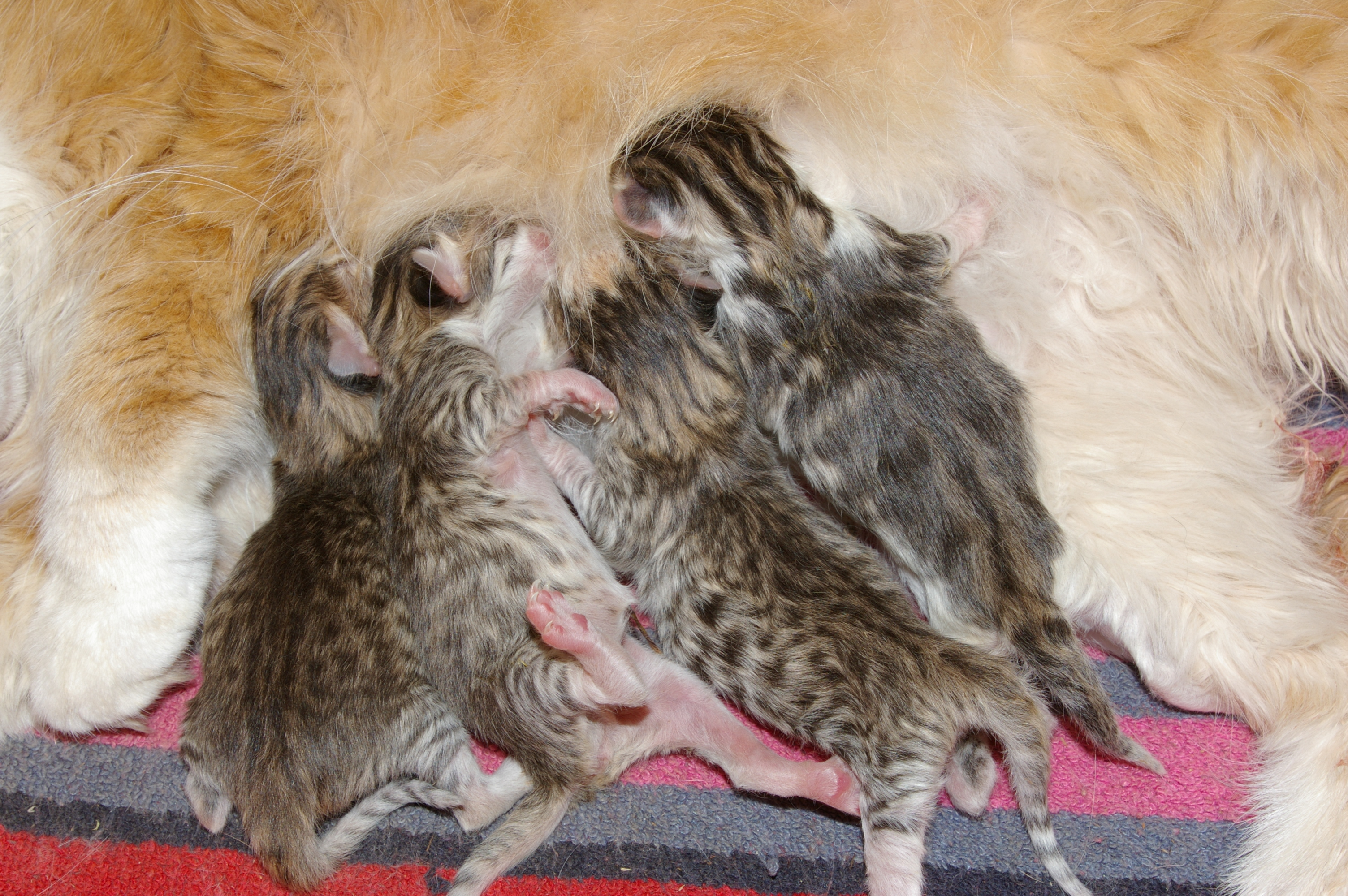 chatons norvégiens nouveau-nés ambre spotted tabby et blotched tabby